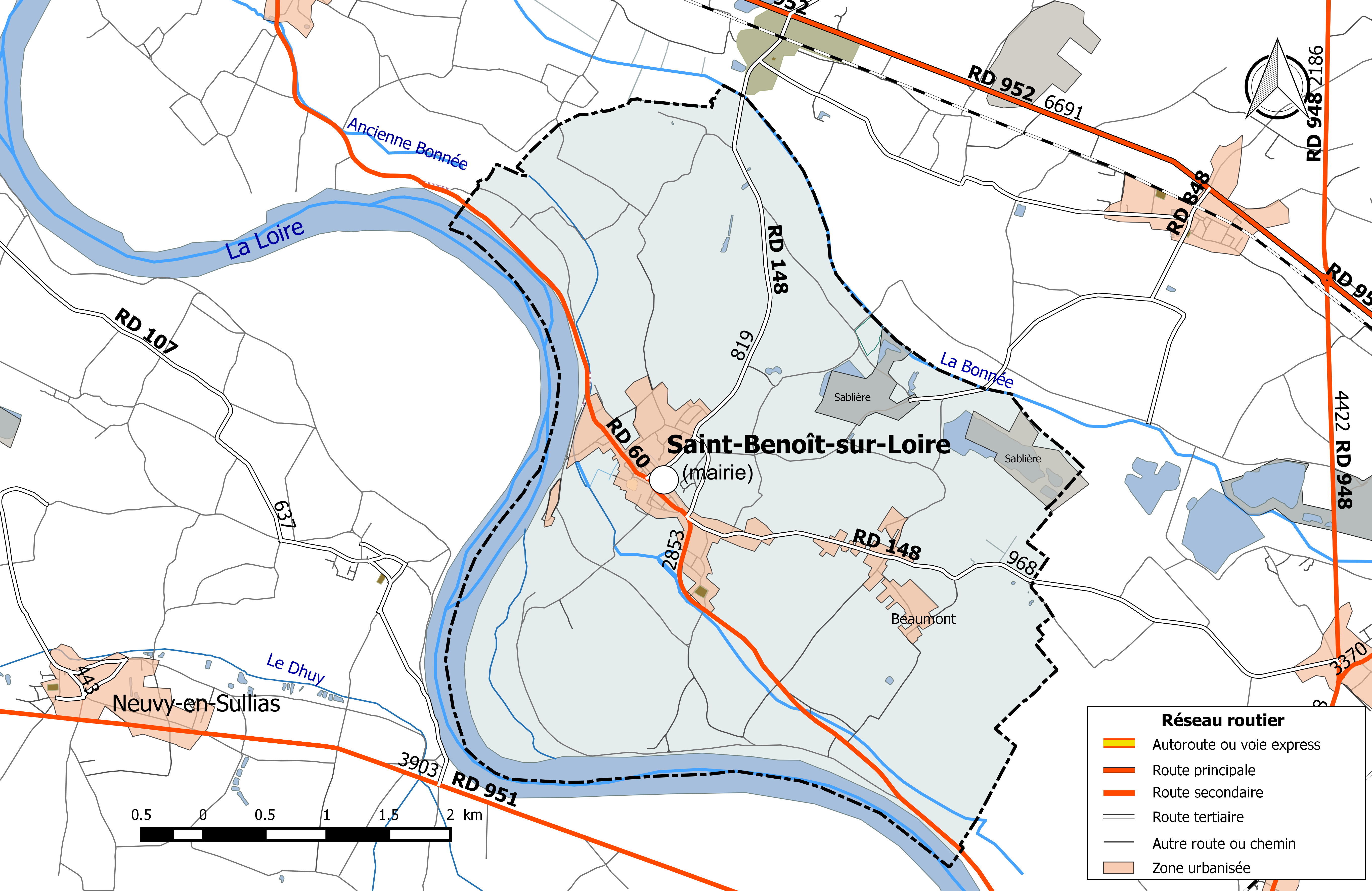 Carte du réseau routier de la commune de Saint-Benoît-sur-Loire.